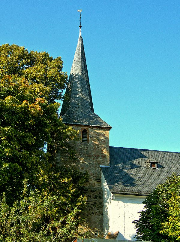 Kirche Höringhausen (Rückseite mit Turm)